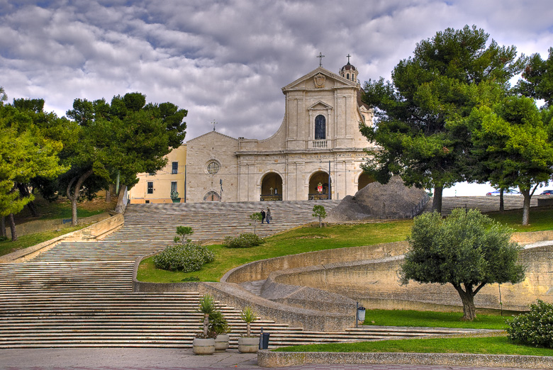 Scalinata prospiciente la Basilica N.S. di Bonaria